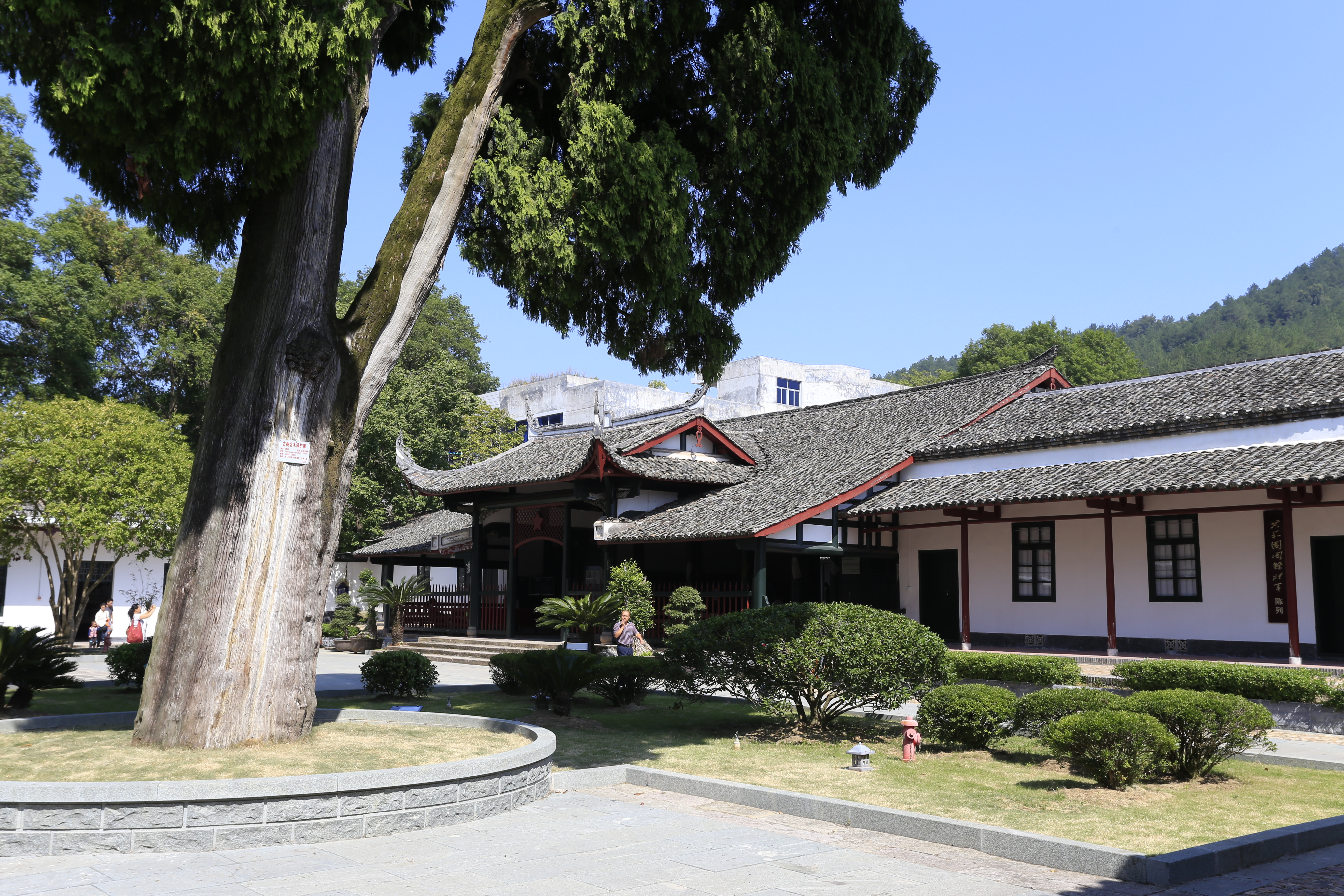 福建省长汀县"福建省苏维埃政府旧址"（即福建省工农民主政府旧址，原汀州府试院）—— 唐代侧柏和大殿